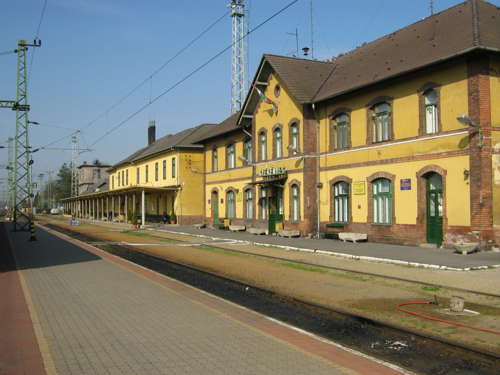 Gyékényes vasútállomása